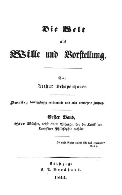 Scan of Schopenhauer's expanded 2ed (1844) Die Welt als Wille und Vorstellung made by me.